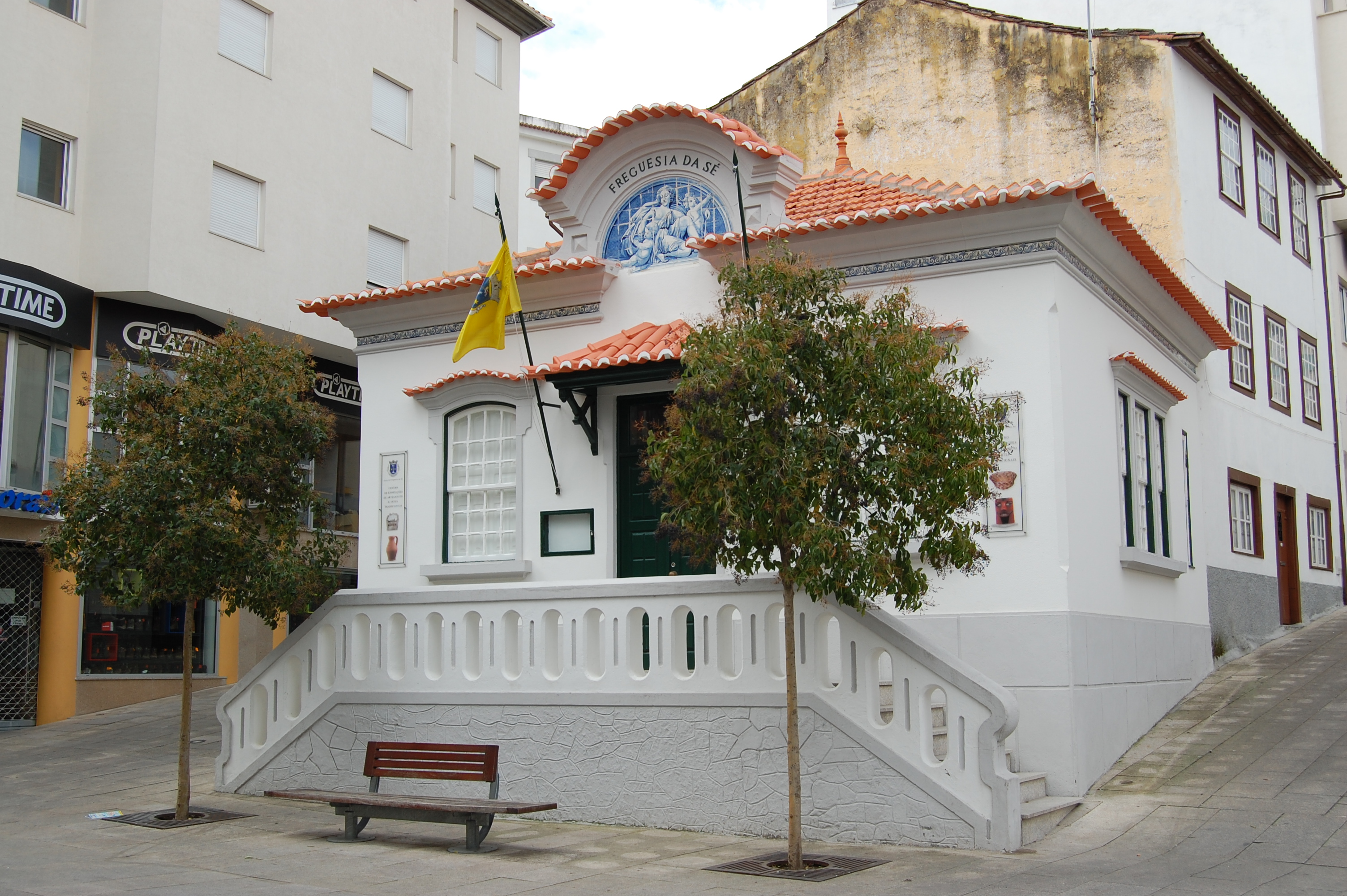 Antigo sede da junta de freguesia da Sé, na cidade de Bragança, no nordeste de Portugal.